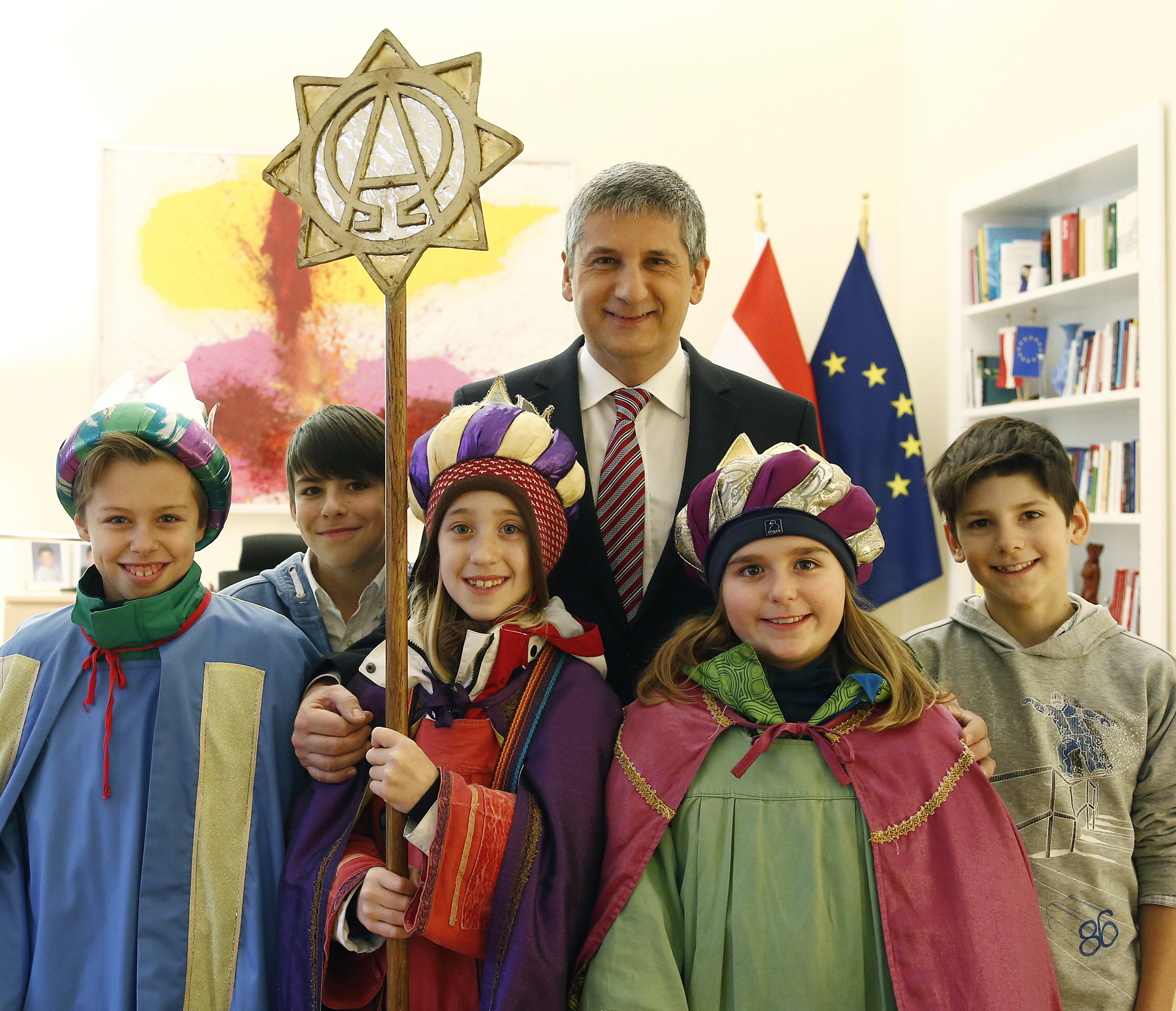 Die Sternsinger besuchen Aussenminister Michael Spindelegger. Aussenministerium, Minoritenplatz, Wien, 04.01.2013, Foto: Dragan Tatic